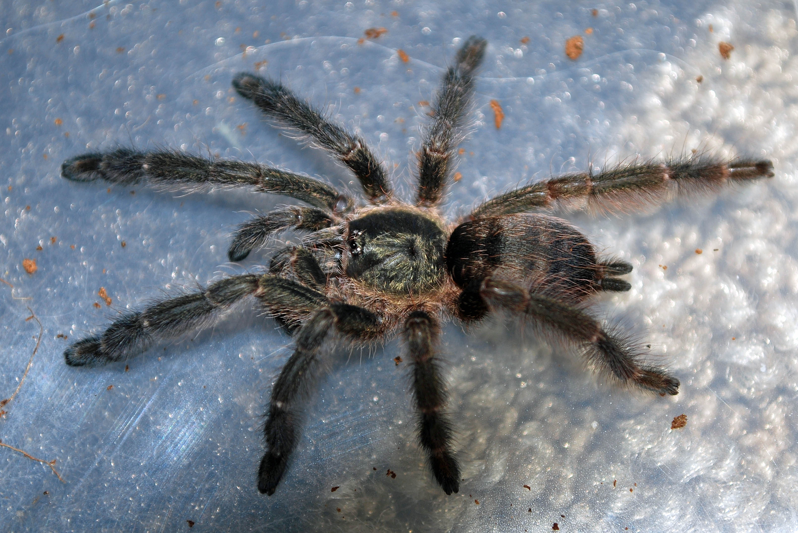 Tapinauchenius cupreus